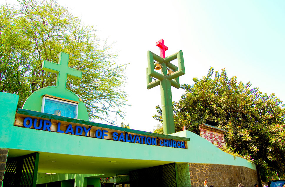 Portuguese Church Dadar